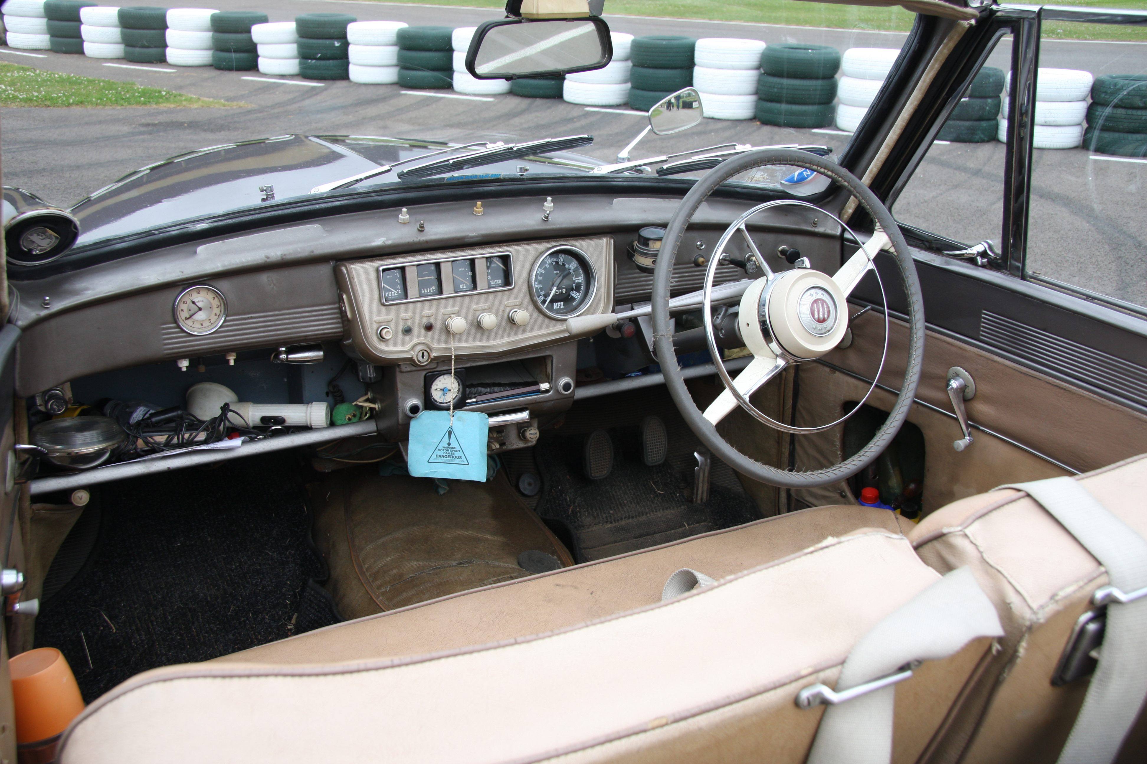 Hillman Minx